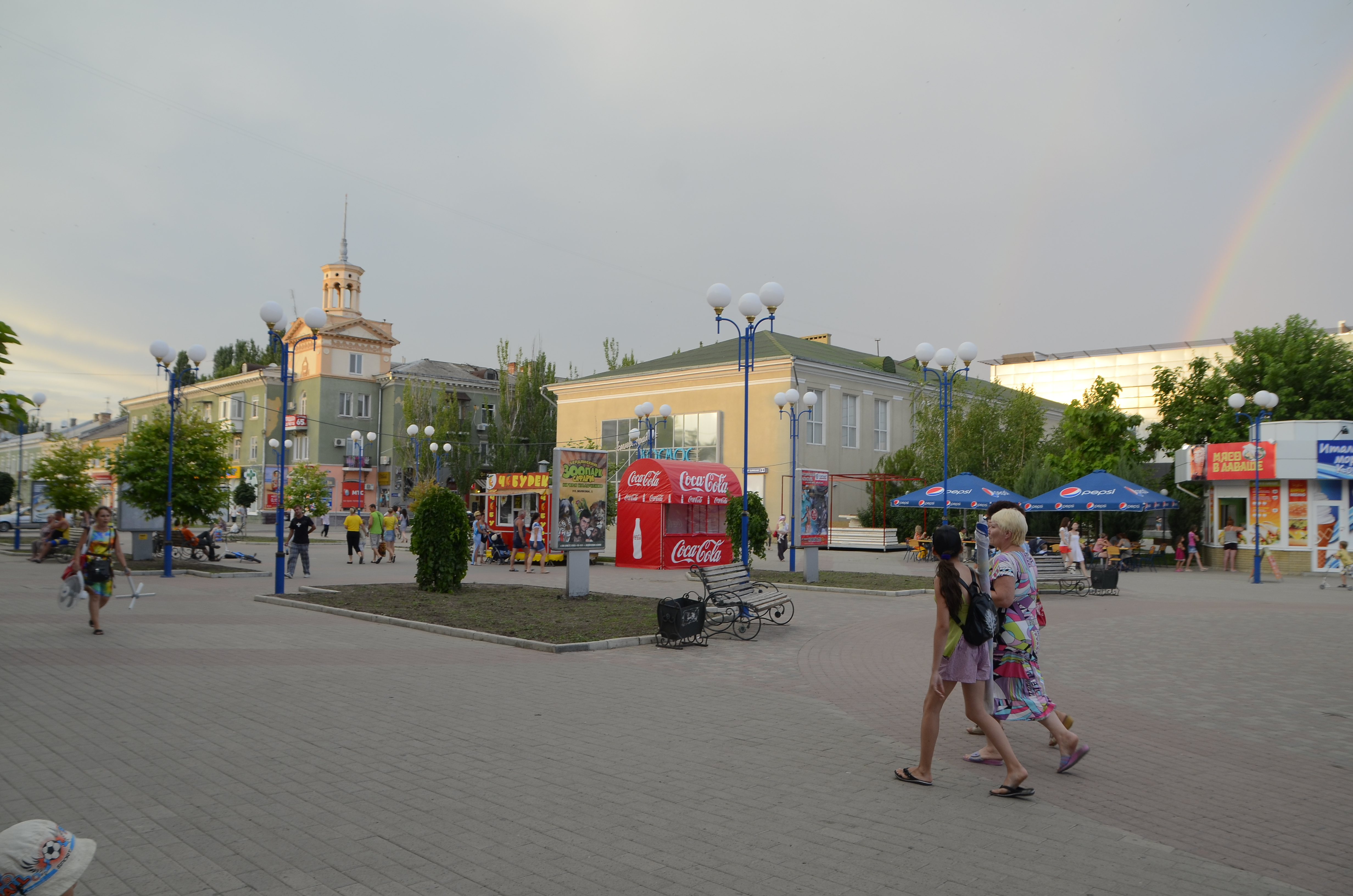 Бердянск